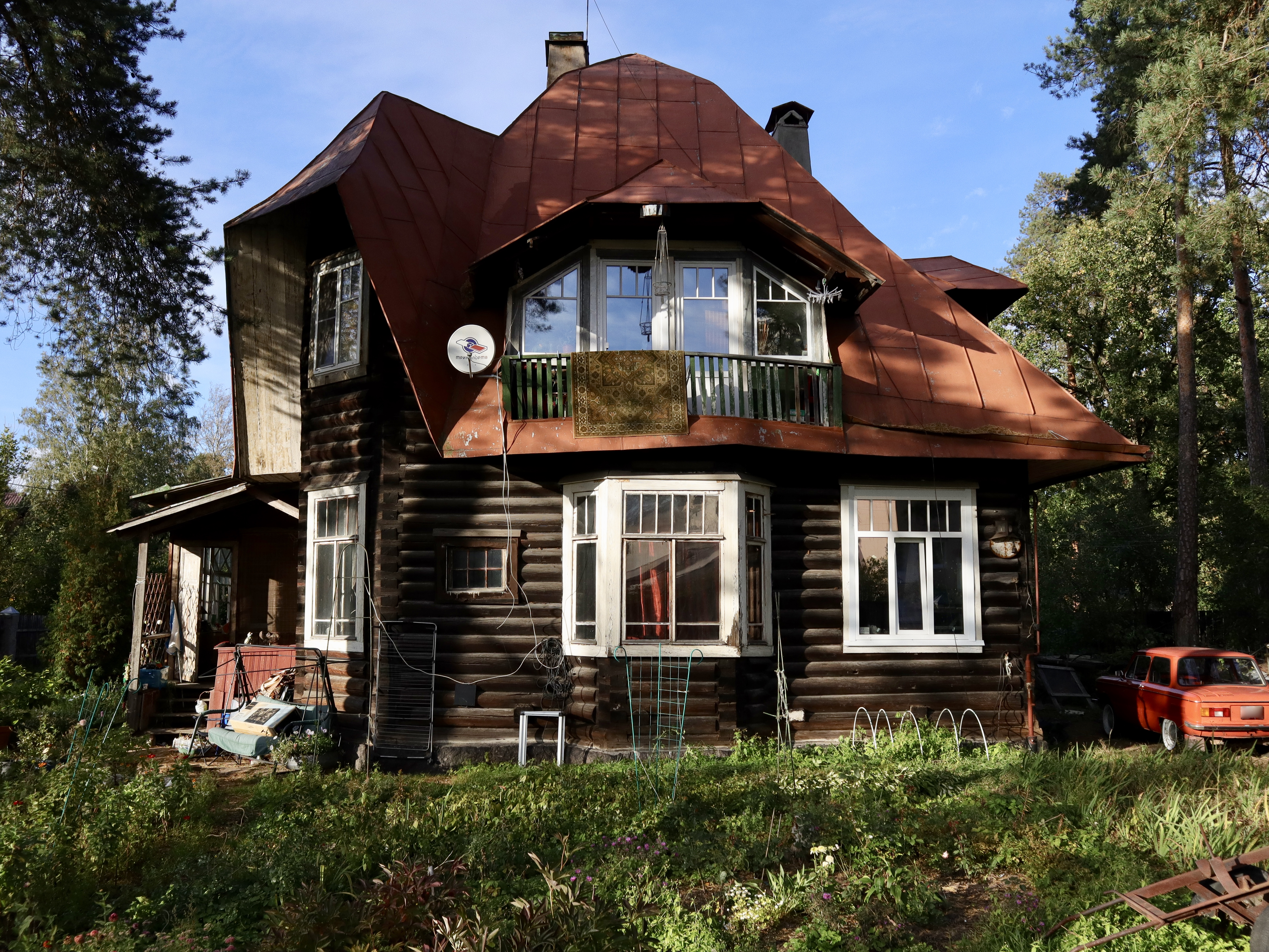 Дача А.П. Вайтенса (вторая): Лесная улица, 23, Ключевой проспект, Ольгино, Приморский район, Санкт-Петербург